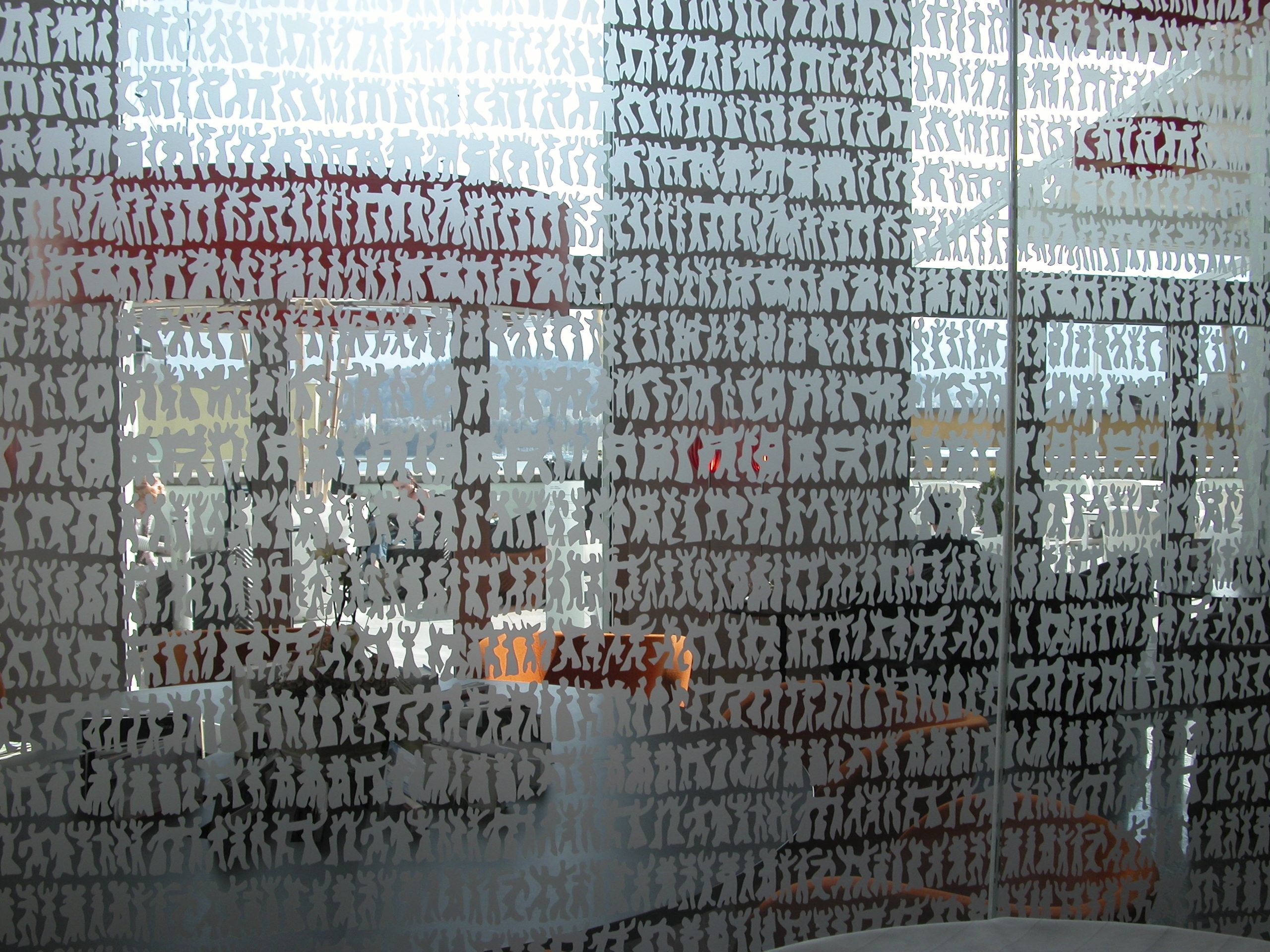 Alfons Bürgler Glaswand für die Hirslandenklinik St. Anna in Luzern (Ausschnitt) 2007